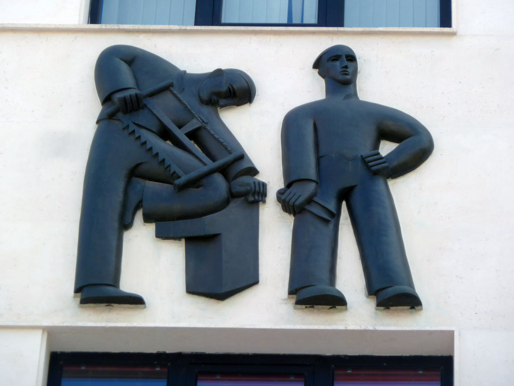 Instituto Nacional de Previsión. 1936 Autor.- Goico-Aguirre. Oviedo.